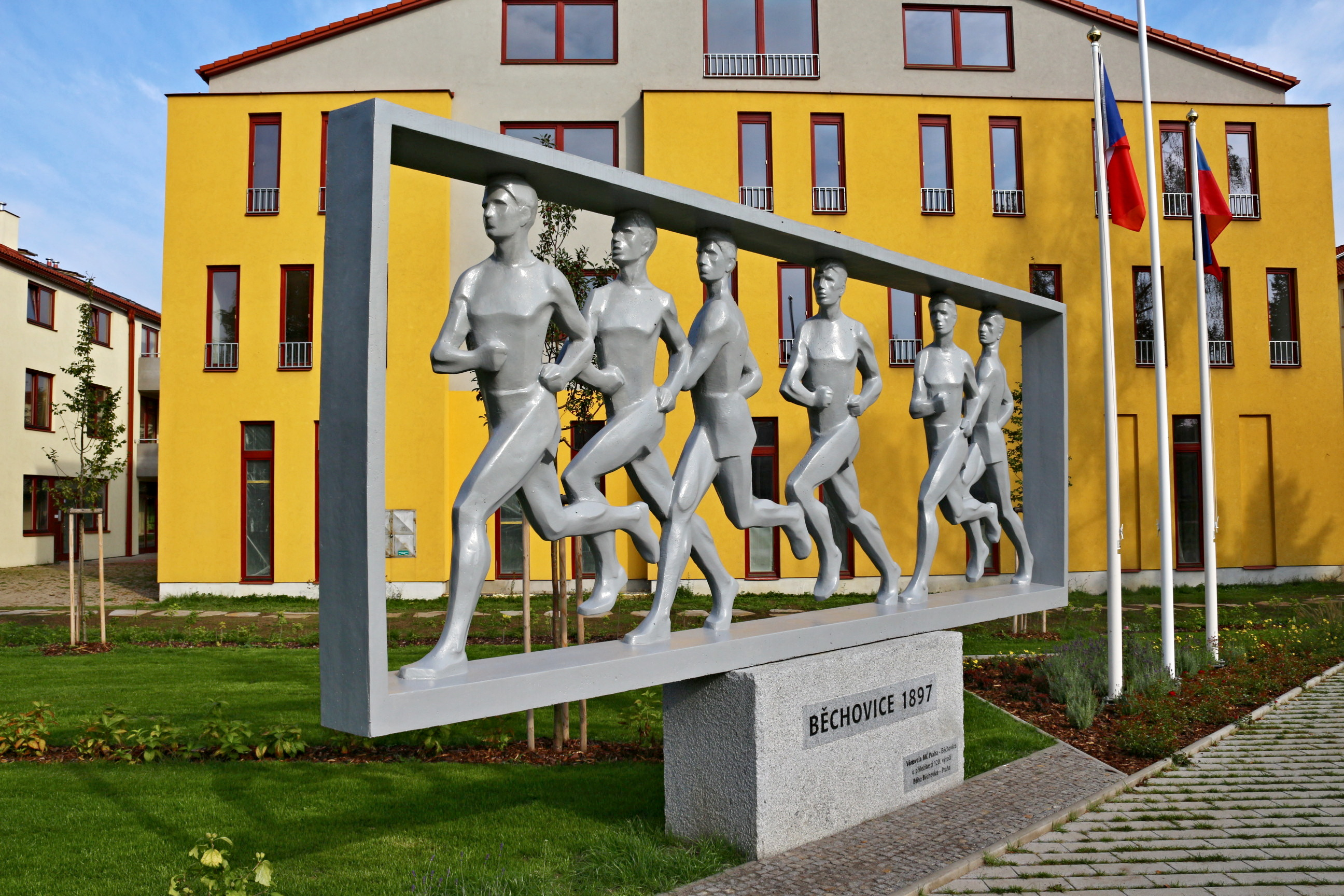 Běchovice Sad Běžců